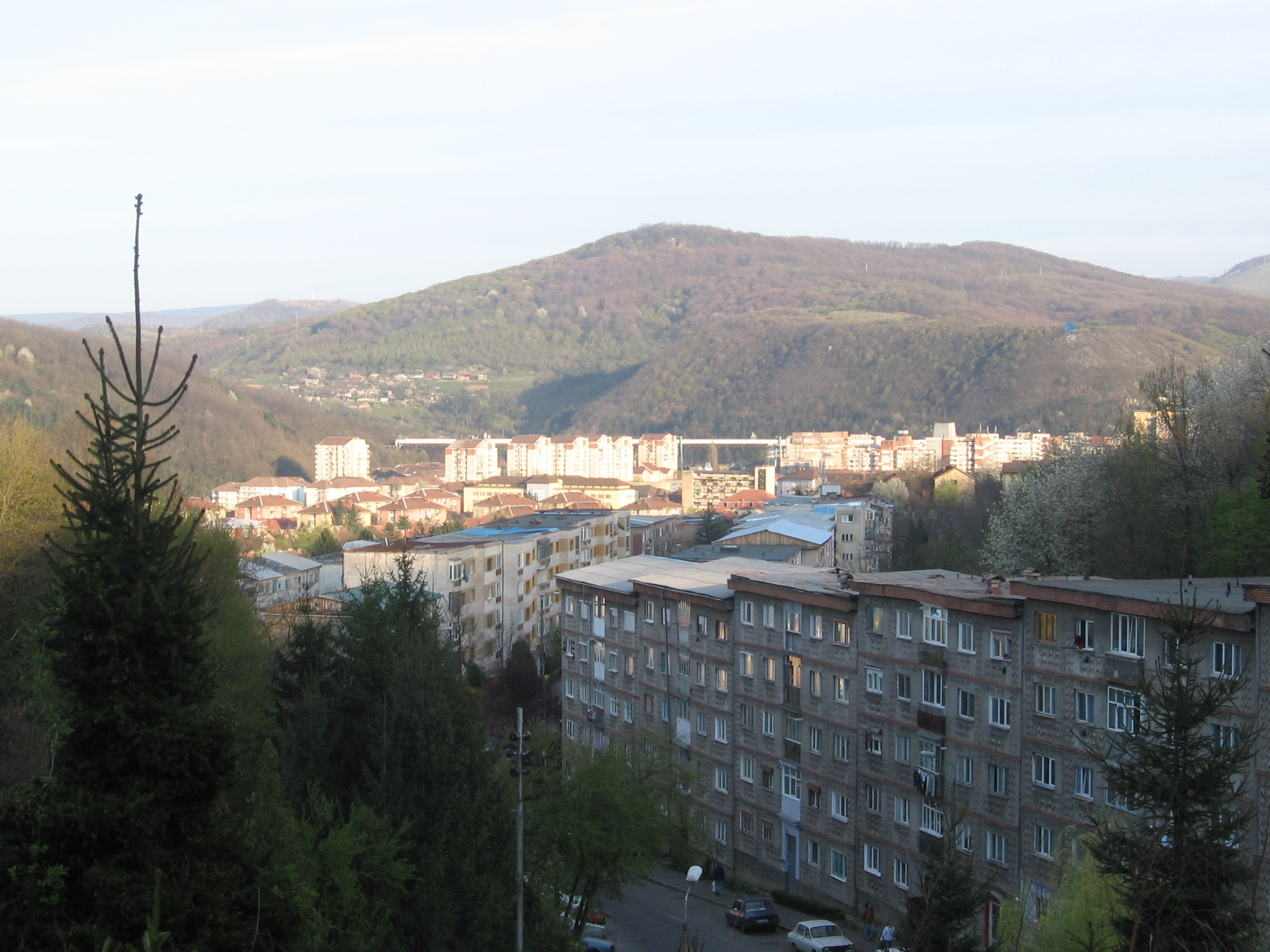 In fotogafie se vede cartierul Moroasa II, o parte din zona Luncă şi Poiana Golului. Linia albă care se vede în spatele blocurilor este funicularul (în perioada comunistă, cu ajutorul lui se transporta calcar în Combinatul Siderurgic), iar în partea dreapta sus - stema albastră reprezintă emblema Uzinei Constructoare de Maşini.